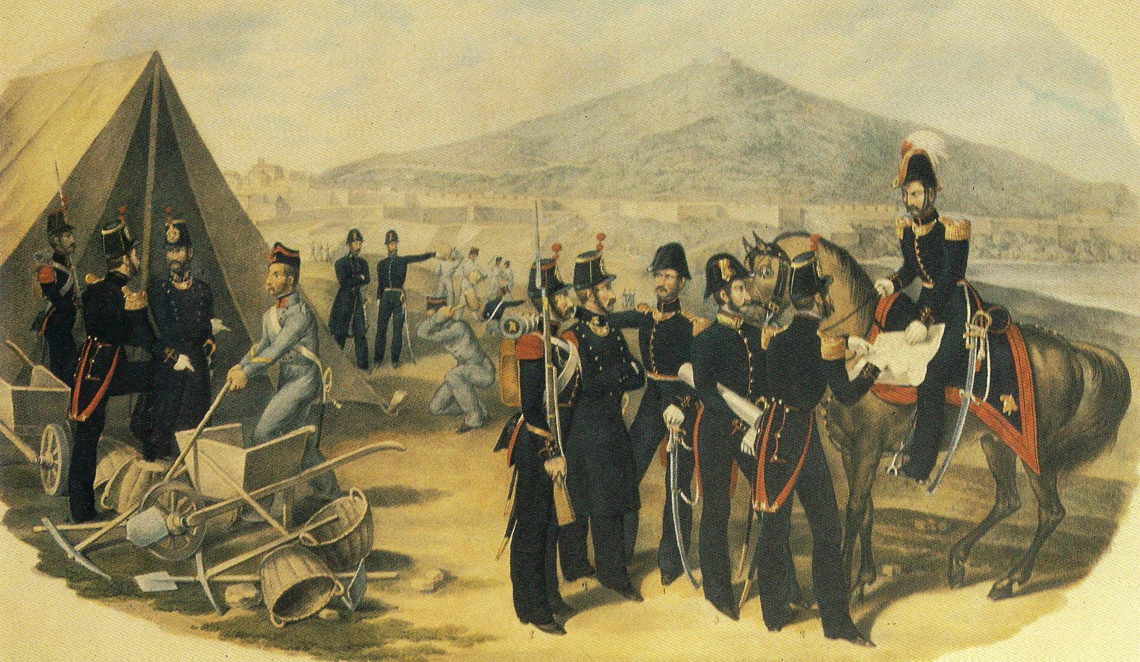 Genio, 1850.